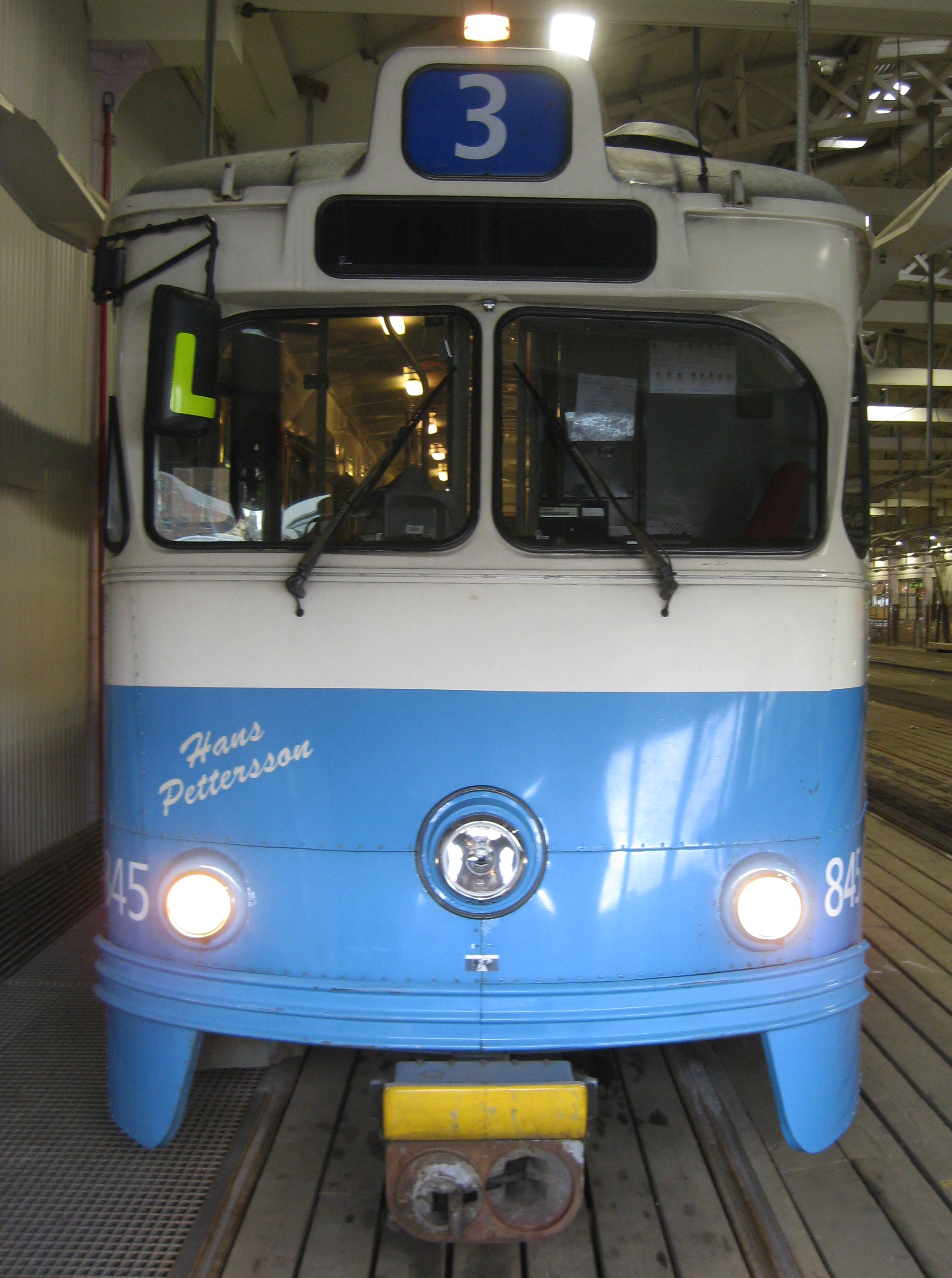 Spårvagn nummer 845 av typen M29 i Vagnhallen Majorna i Göteborg.